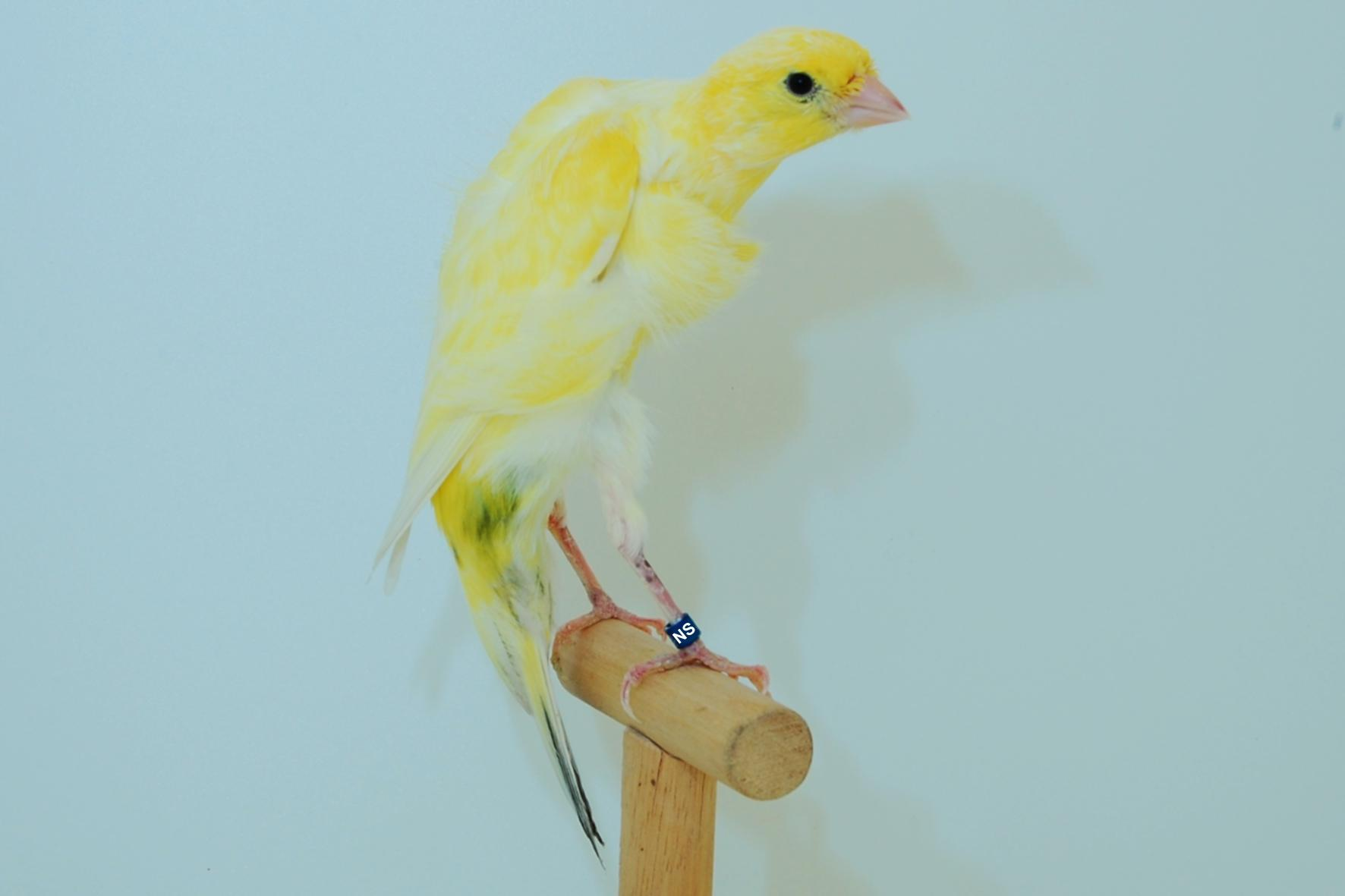 Positurkanarienrasse Südholländer aufgehellt gelb